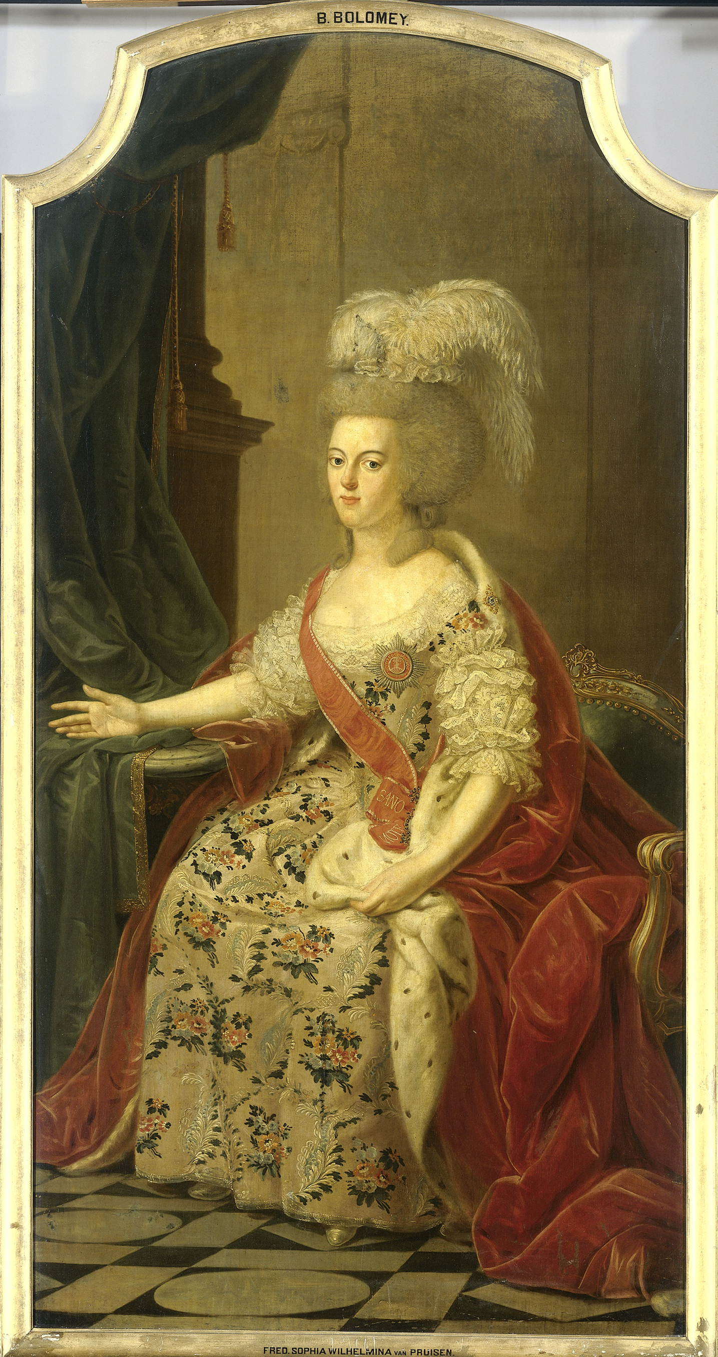 Portret van Frederika Sophia Wilhelmina van Pruisen, echtgenote van Prins Willem V. Zittend, ten voeten uit. Pendant van SK-A-948.